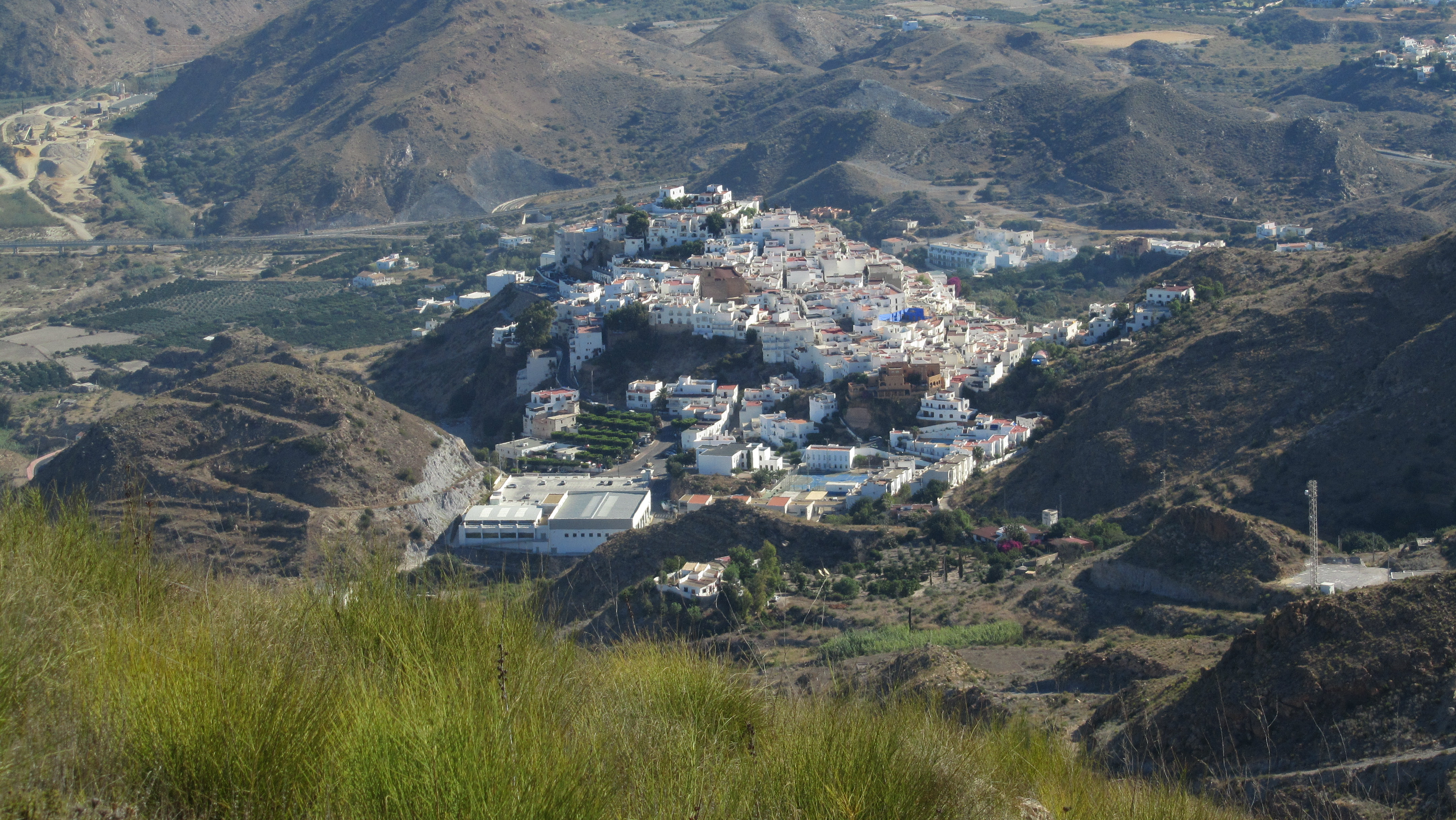 Mojácar pittoresque